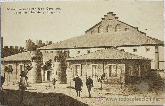 Carcel de Valencia de Don Juan